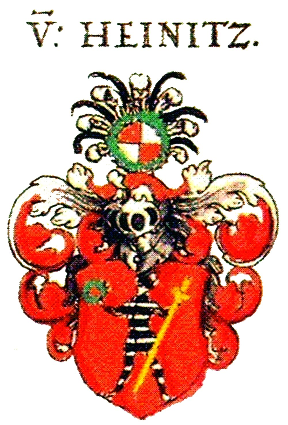 Wappen der Familie von "Heinitz" nach Siebmachers Wappenbuch